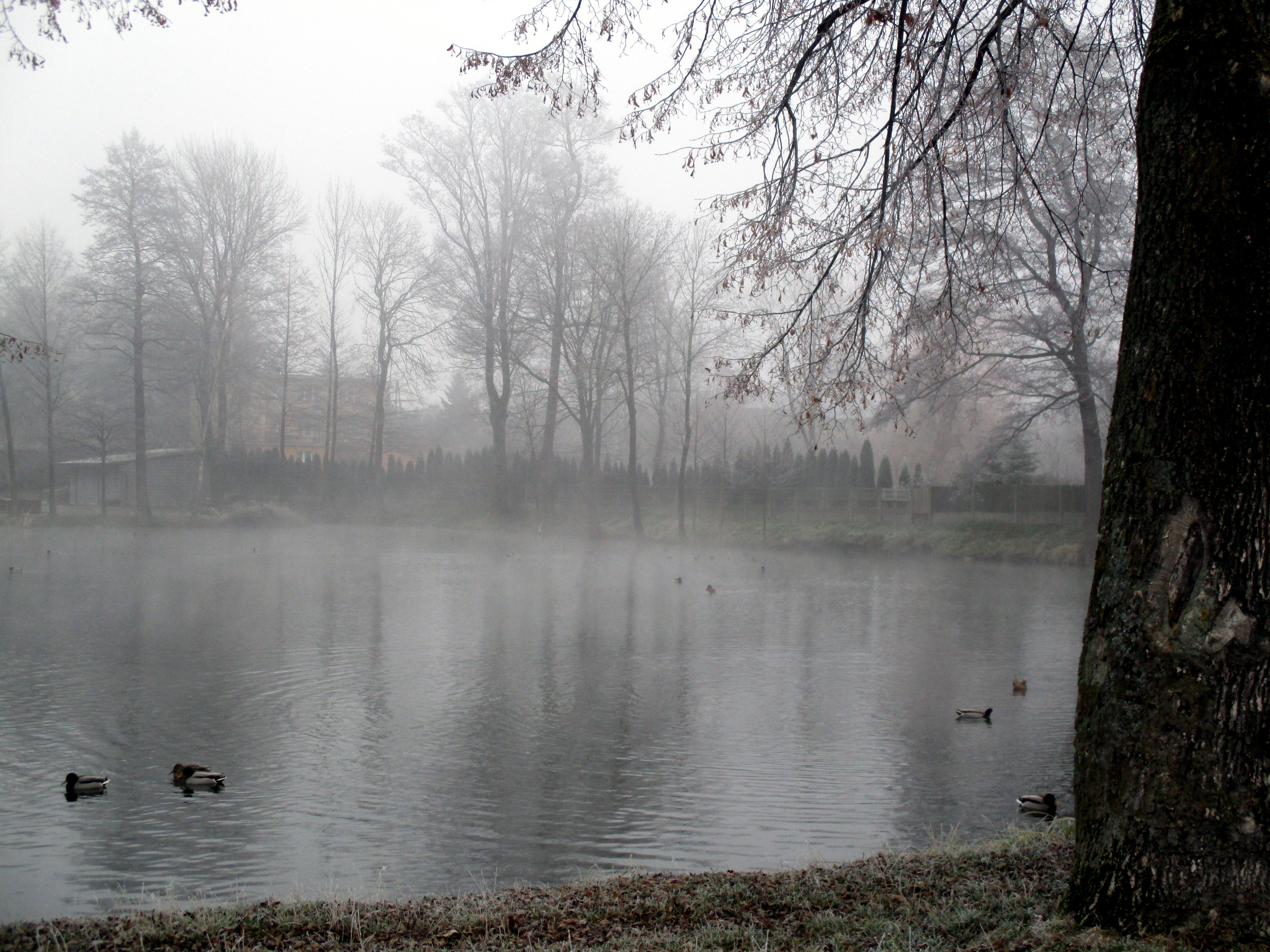 Staw przed pałacem w Borownie.